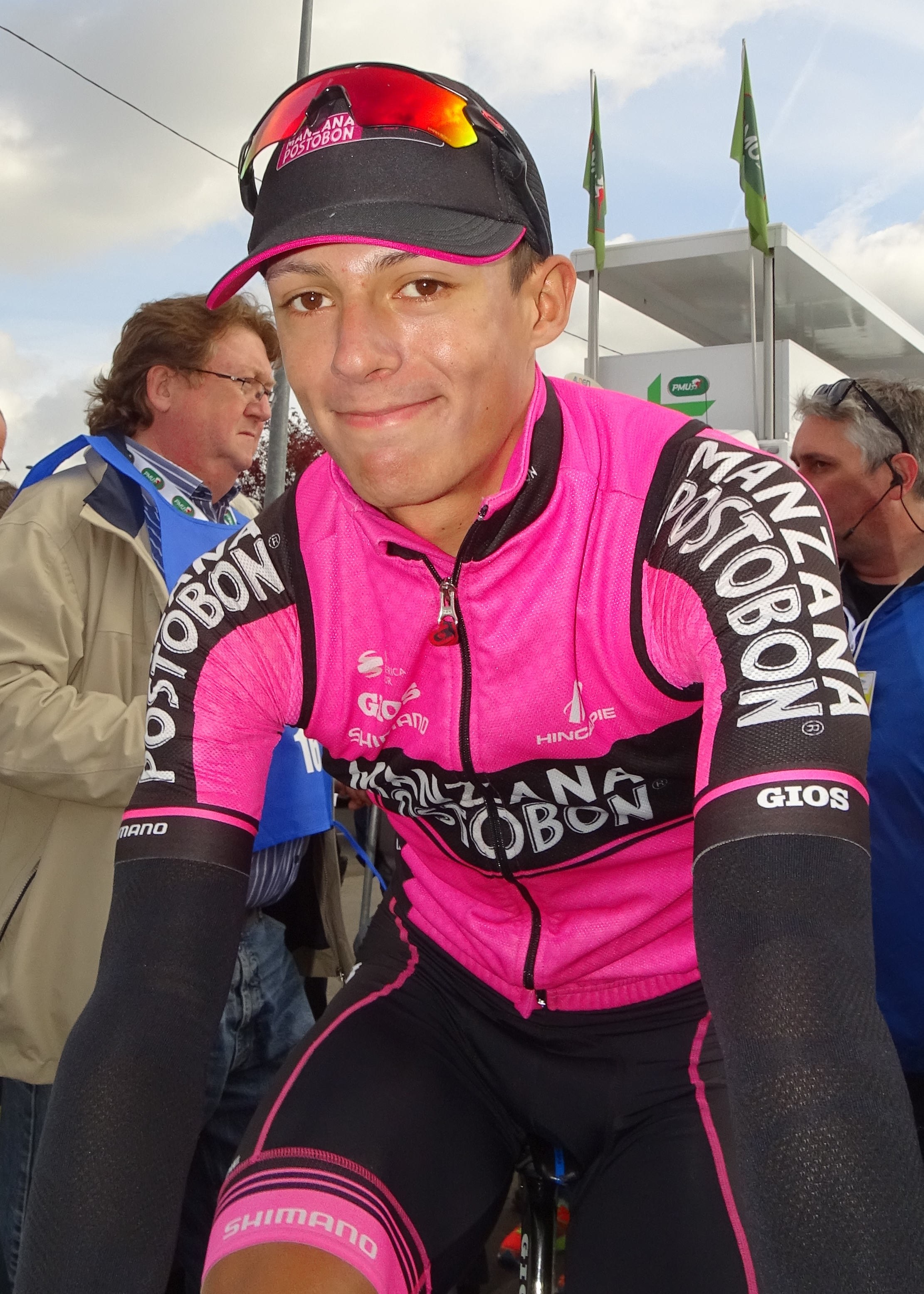 Reportage réalisé le jeudi 13 avril à l'occasion du départ et de l'arrivée du Grand Prix de Denain 2017 à Denain, Nord, Nord-Pas-de-Calais-Picardie, France.